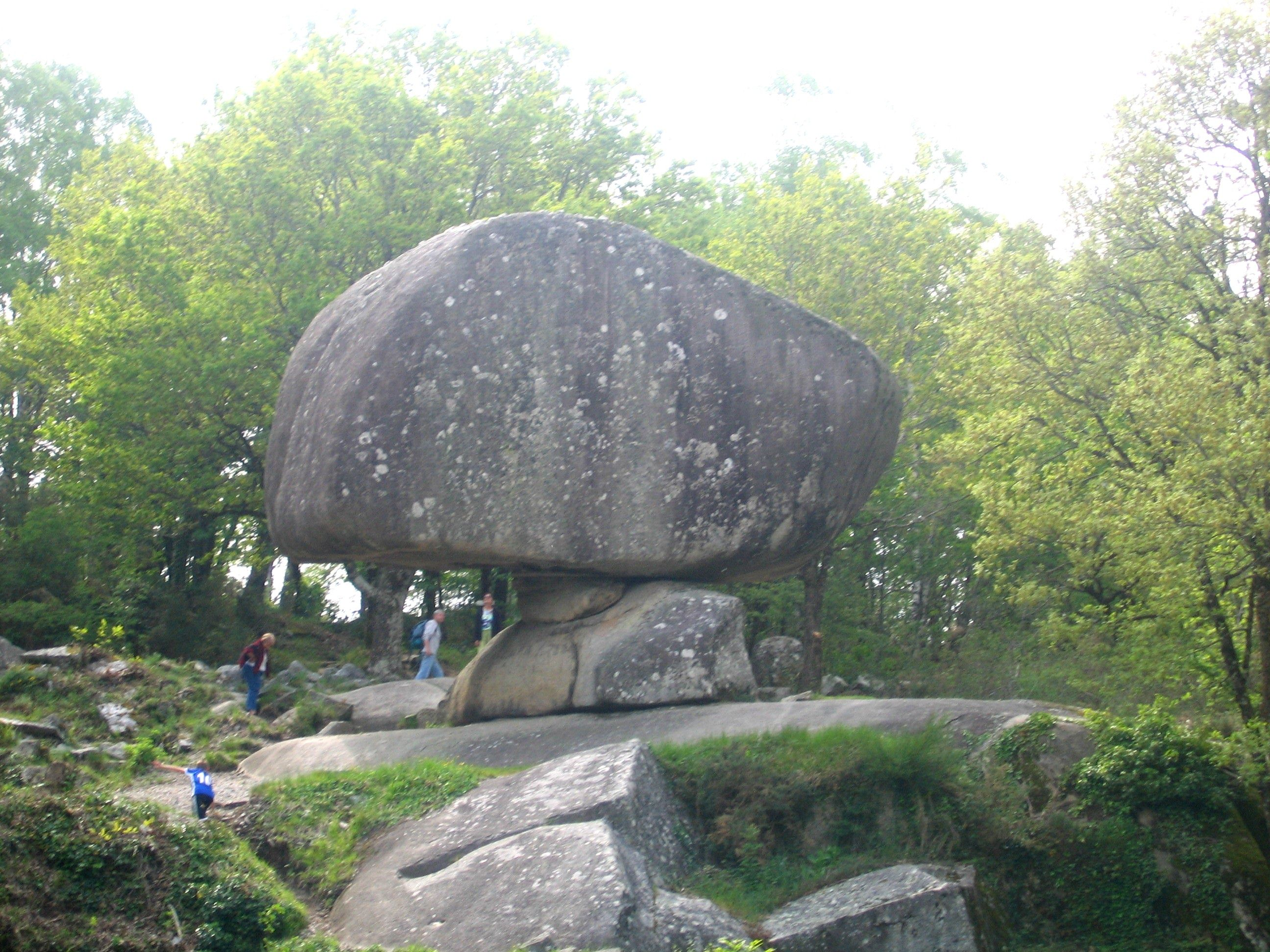 Parc Naturel Régional du Haut-Languedoc, massif du Sidobre, commune de Lacrouzette (Tarn), bloc granitique "Peyro Clabado"